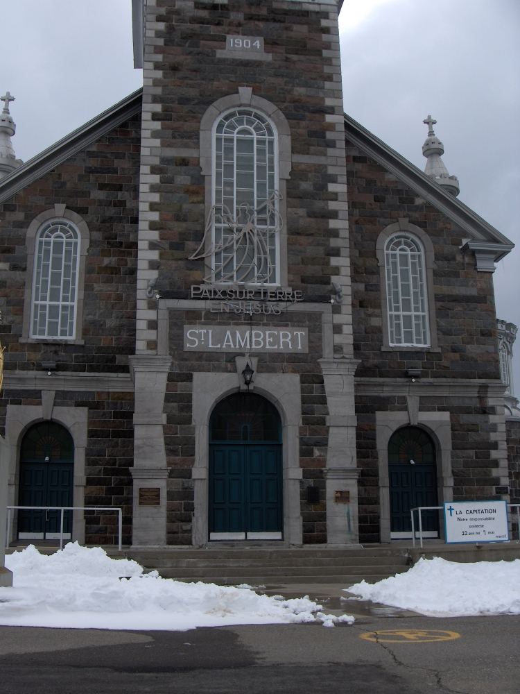 Église Saint-Lambert-de-Lauzon